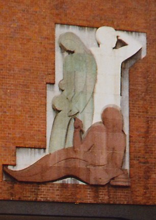 "Dreigliederung" von Helmuth Schepp, Aachen Peterstraße.